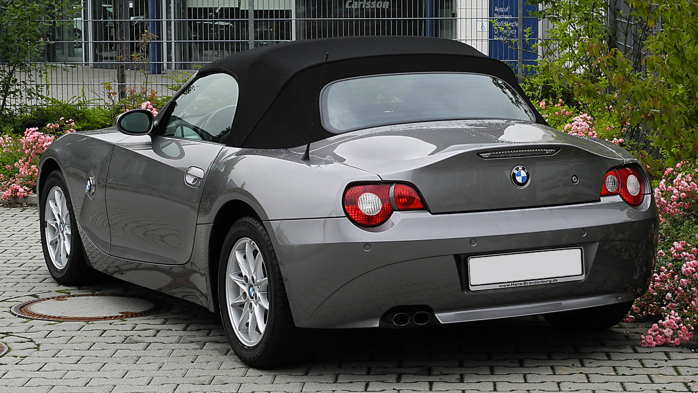 BMW Z4 2.2i (E85)